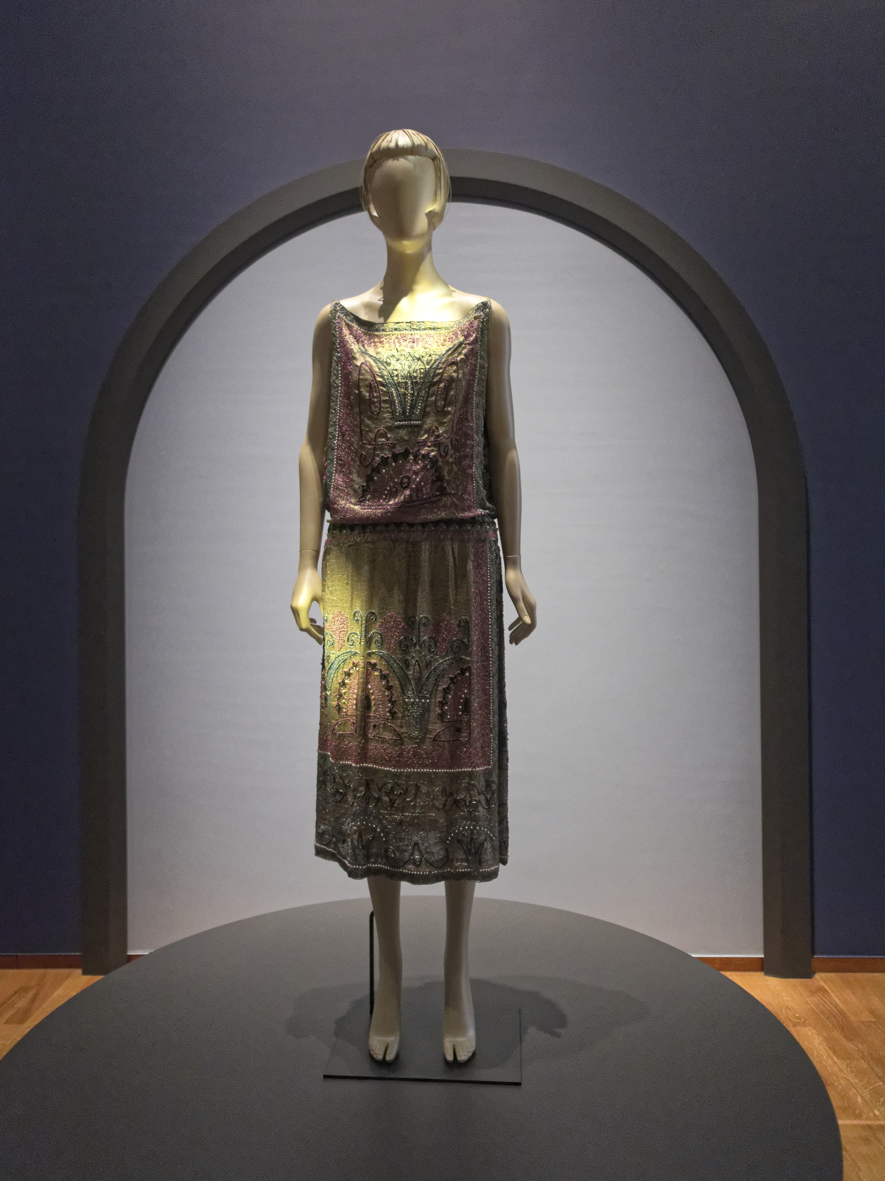 Rijksmuseum